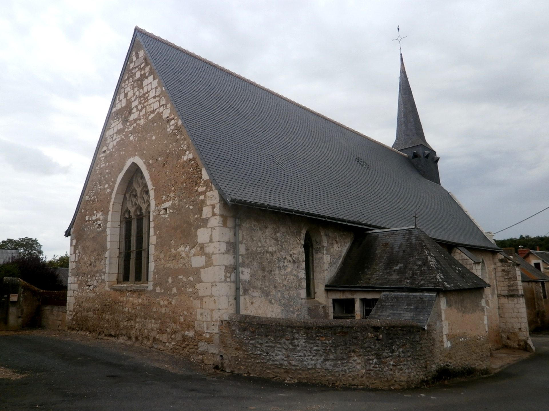 L'église